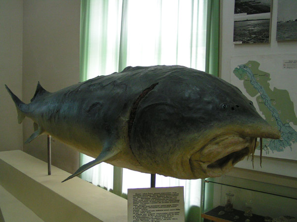 Ryba bieługa. Zdjęcie wykonane w muzeum w Astrachaniu.